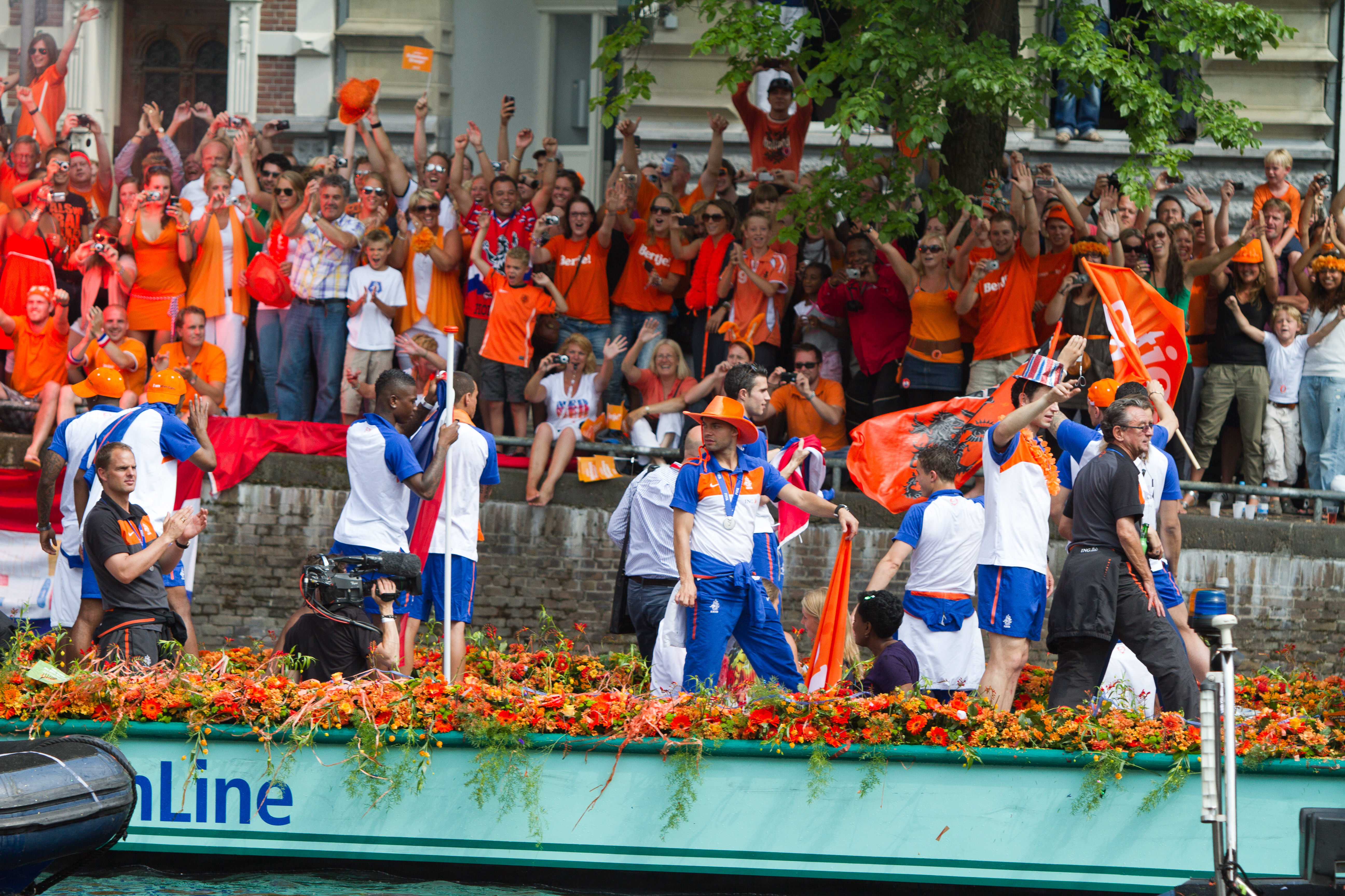 Frank de Boer